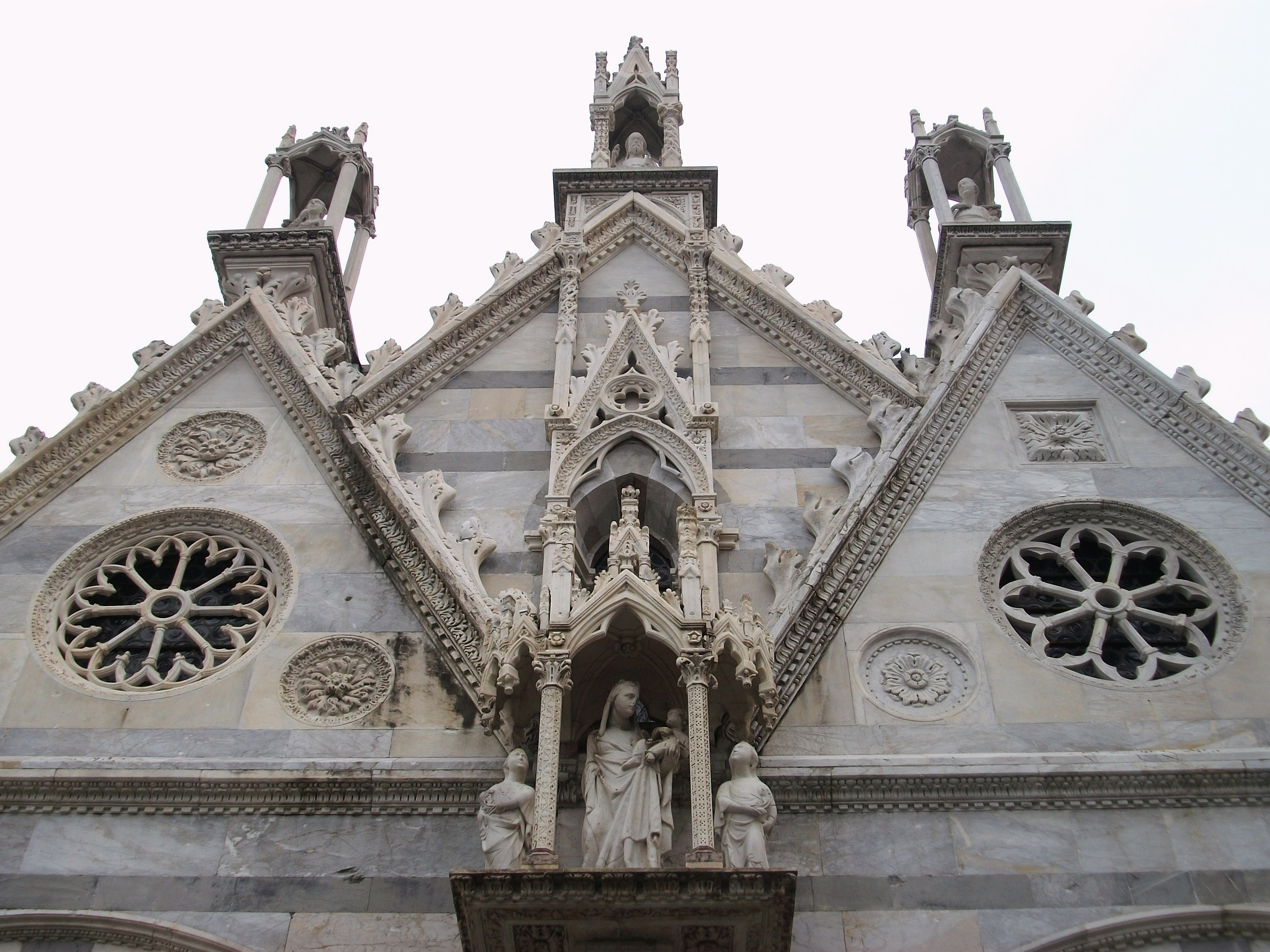 Decoració de l'església de Santa Maria della Spina de Pisa.